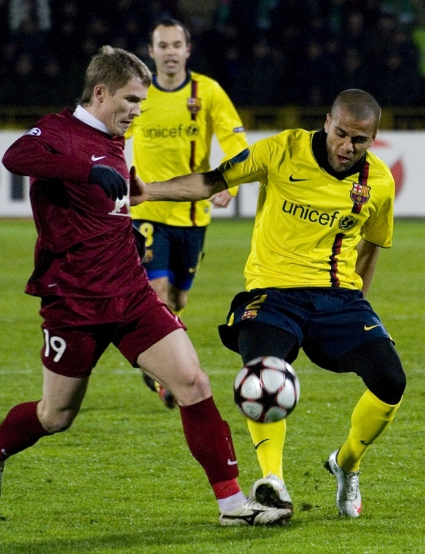 Dani Alves pelea una pelota ante un jugador del Rubin Kazan.